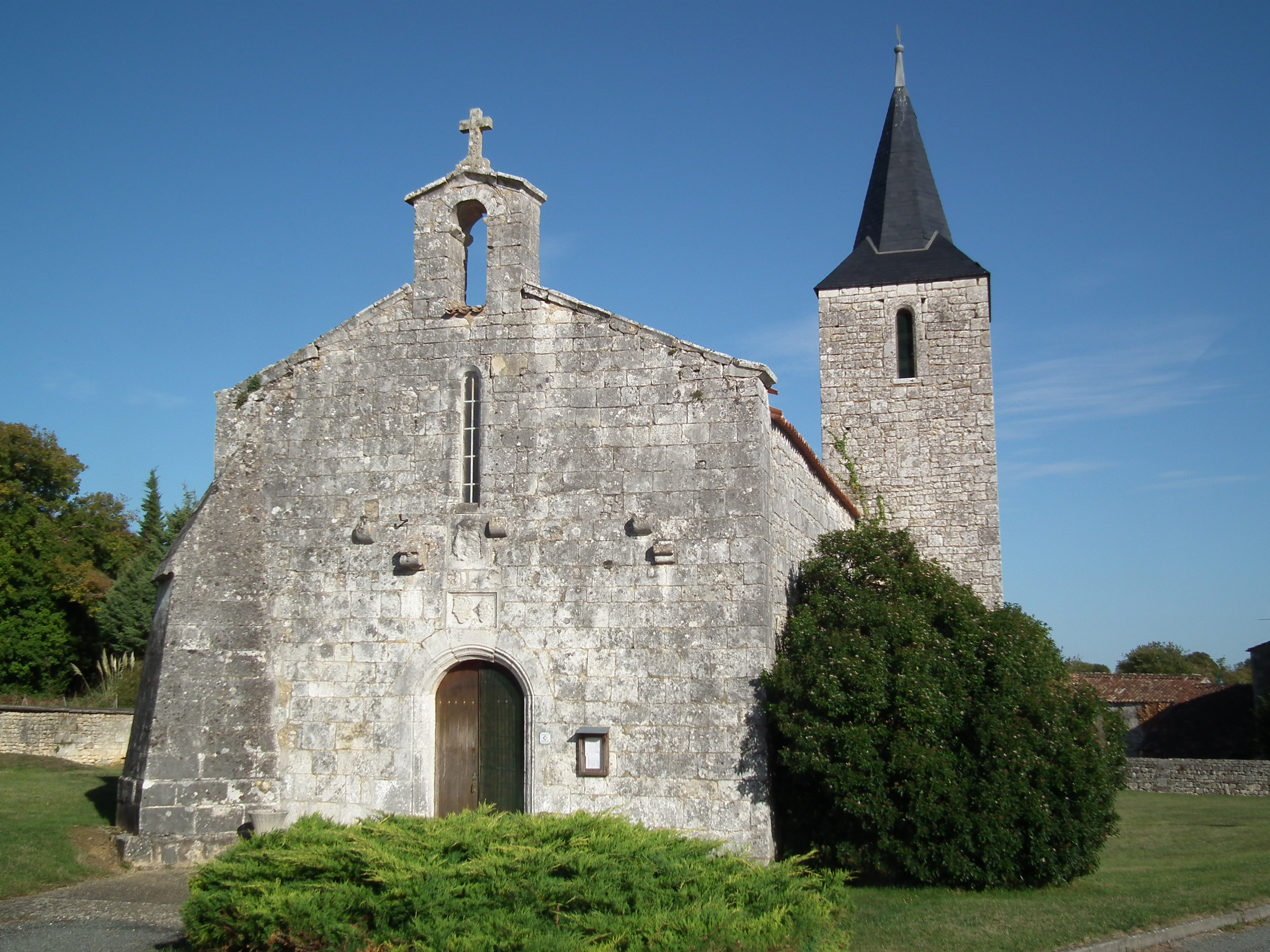 L'église de Saint-Vaize